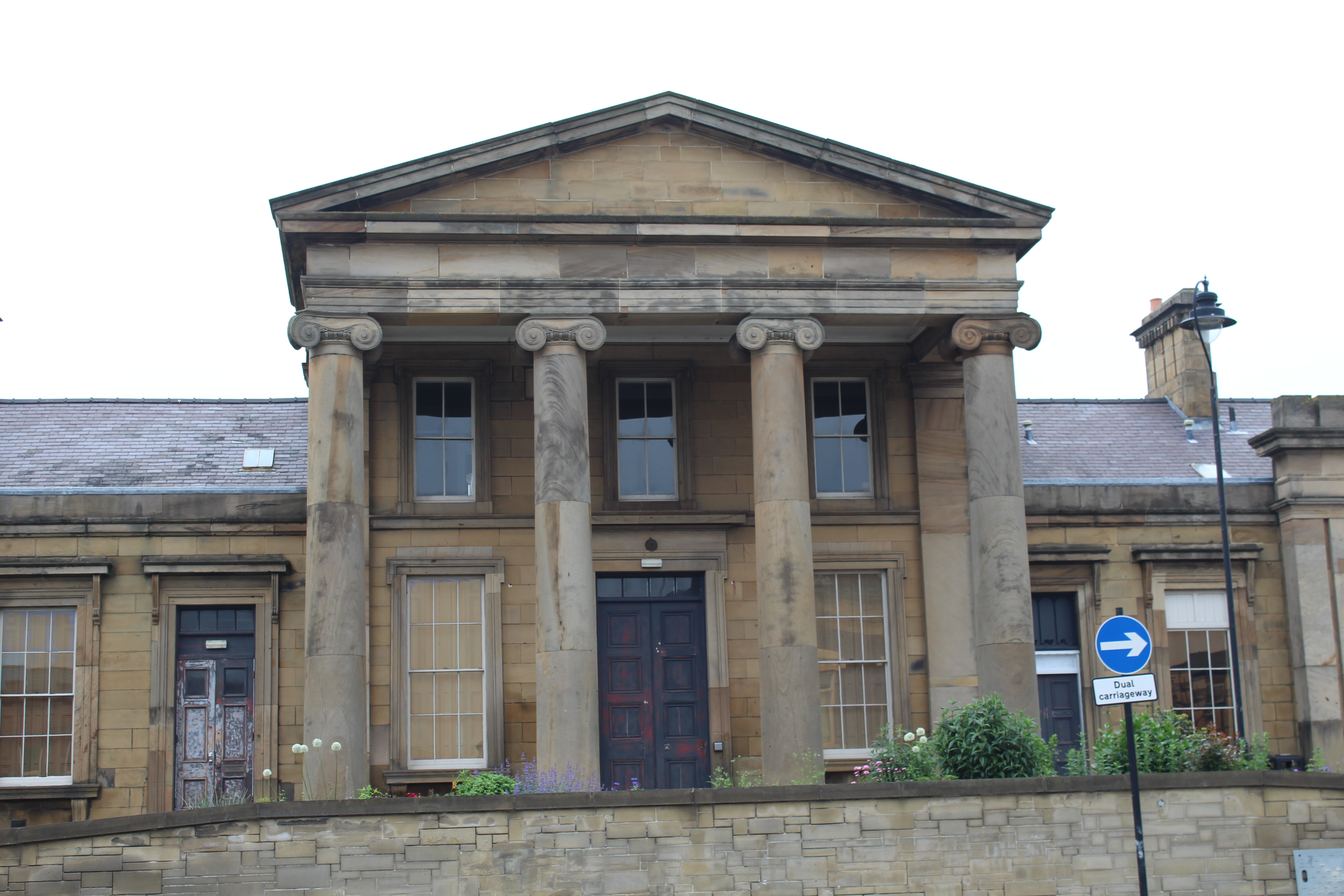 Musée de la gare de Monkwearmouth, Sunderland.